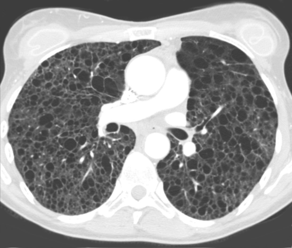 Lymphangioleiomyomatose der Lunge in der Computertomographie: Multiple, dünnwandige zystoide Veränderungen mit gleichmäßiger Verteilung. Aktuell kein Pneumothorax.